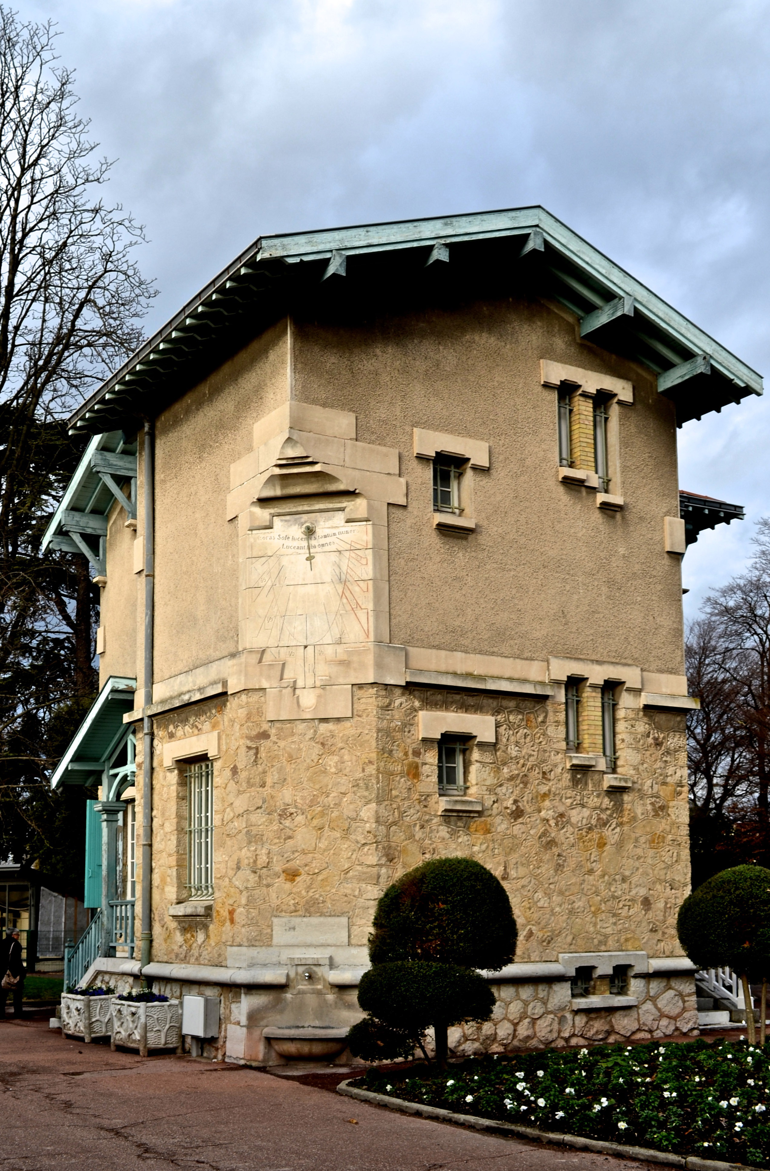 Valence (Drôme, France), parc Jouvet : la maison du gardien.